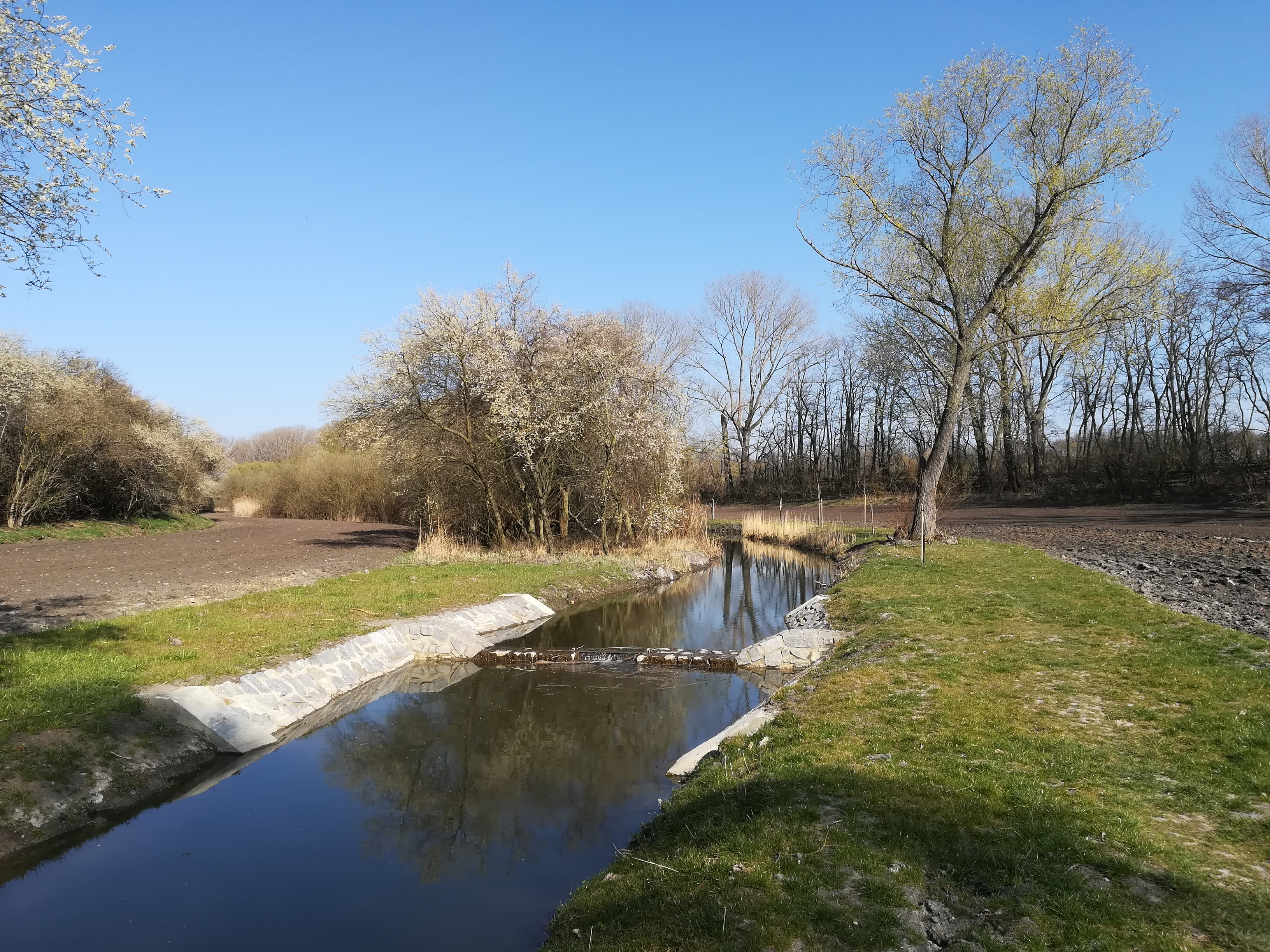 Rajhradice - Dunávka, koryto upravené roku 2019.